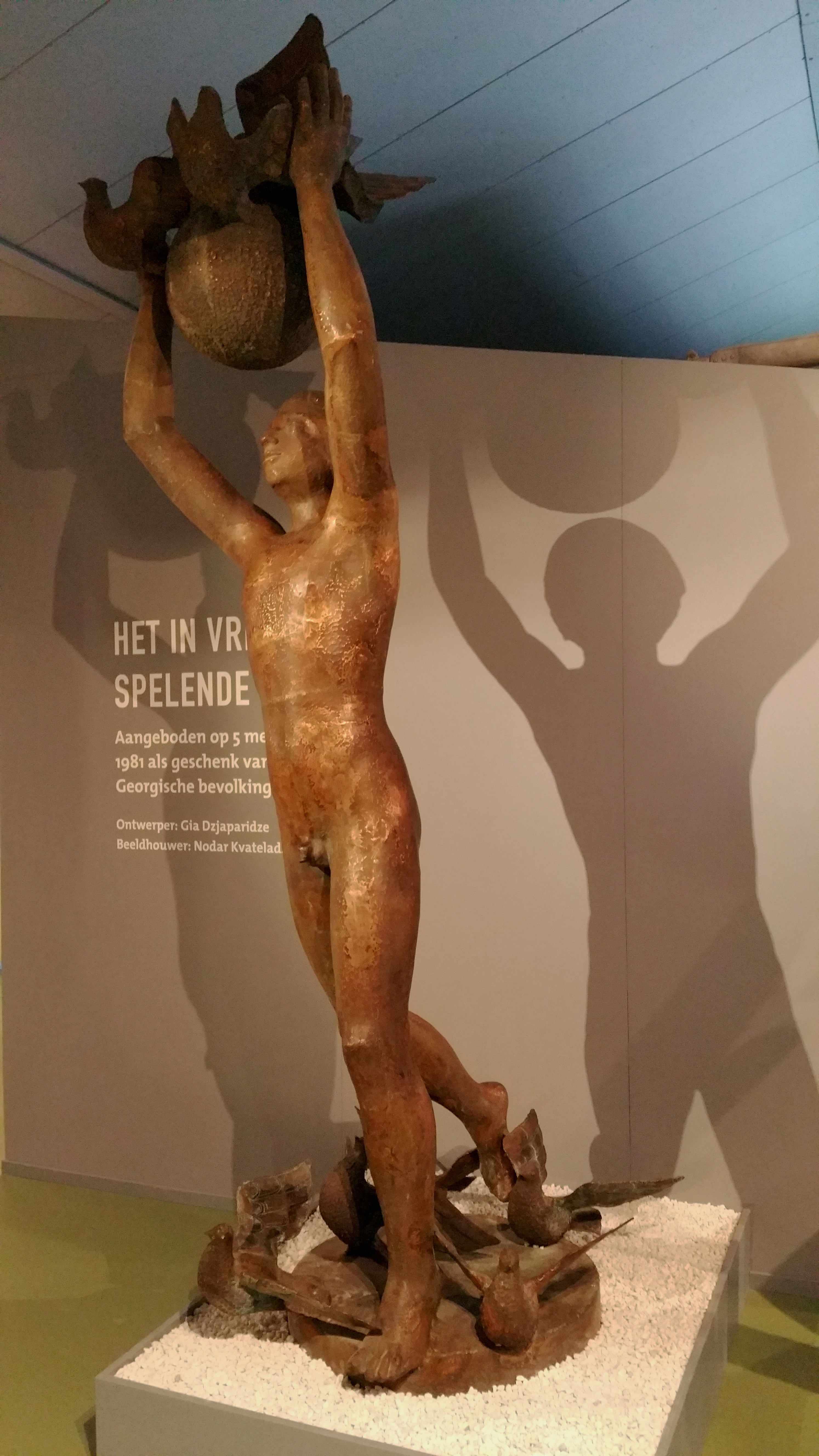 Het in vrede spelende kind, sculptuur. Aangeboden op 5 mei 1981 als geschenk van de Georgische bevolking. Ontwerper: Gia Dzjaparidze. Beeldhouwer: Nodar Kvateladze